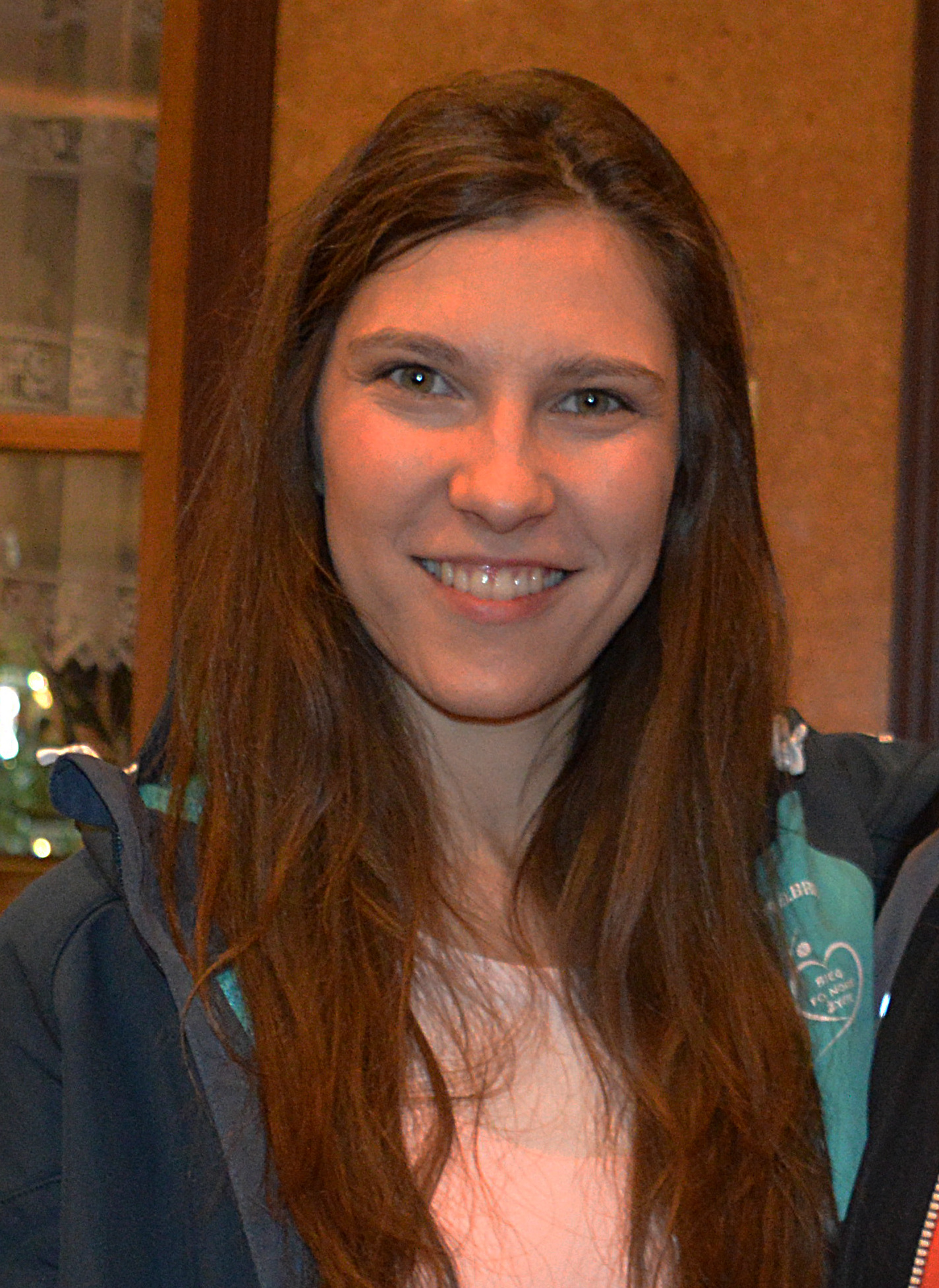 Kamila Kamińska